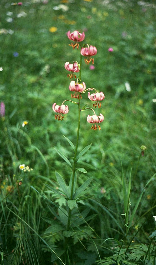 Türkenbund-Lilie (Lilium martagon), Liliengewächse (Liliaceae) - Österreich/Austria/Autriche: Niederösterreich, Oberes Ybbstal, bei der Oisklause